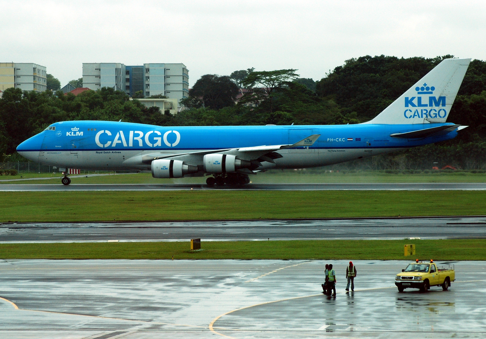 KLM Boeing 747-400ERF/SCD (PH-CKC) landing on 20R at Singapore Changi Airport (SIN/WSSS).